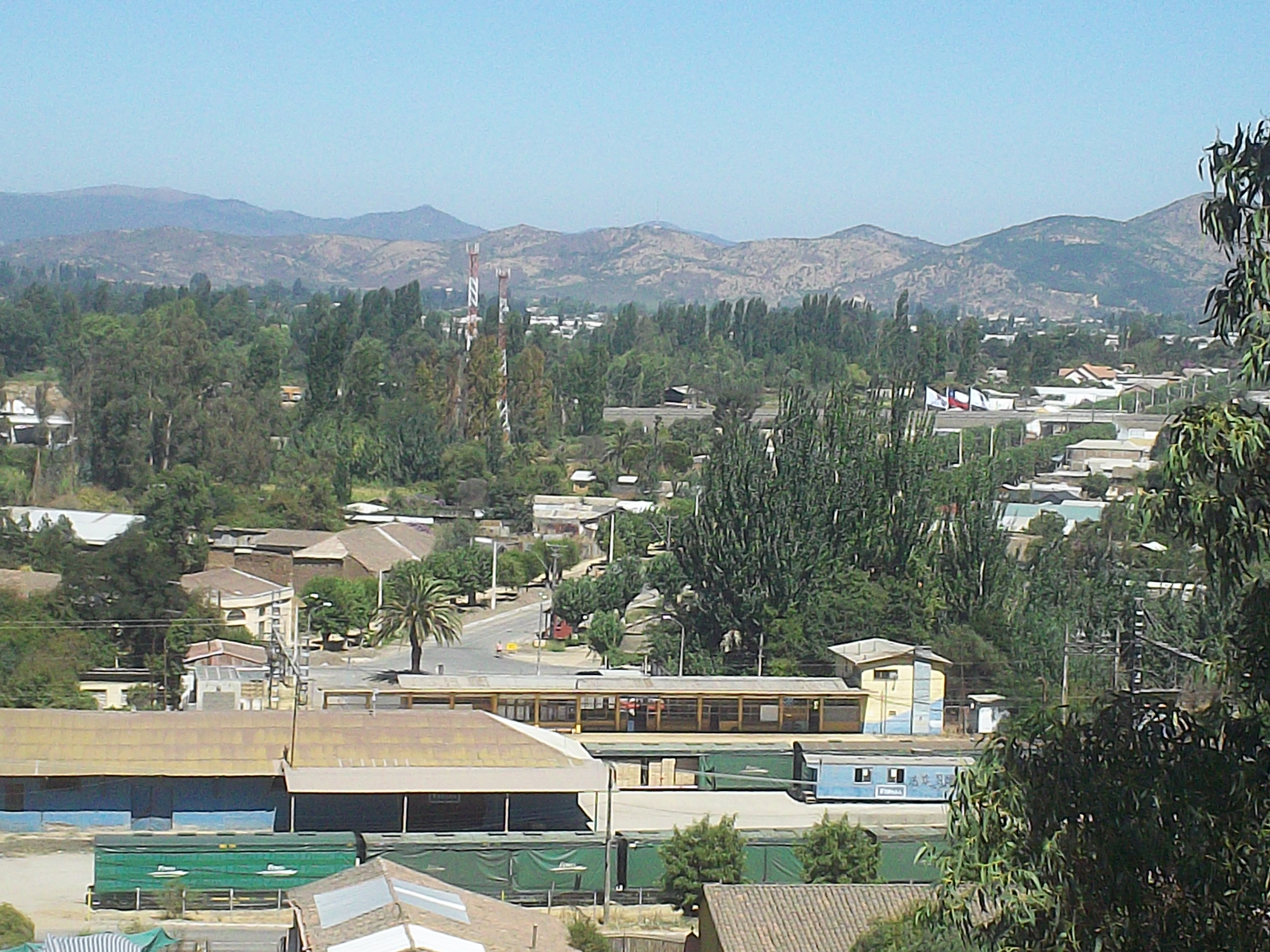 Vista de Estación San Javier desde Cerro La Virgen